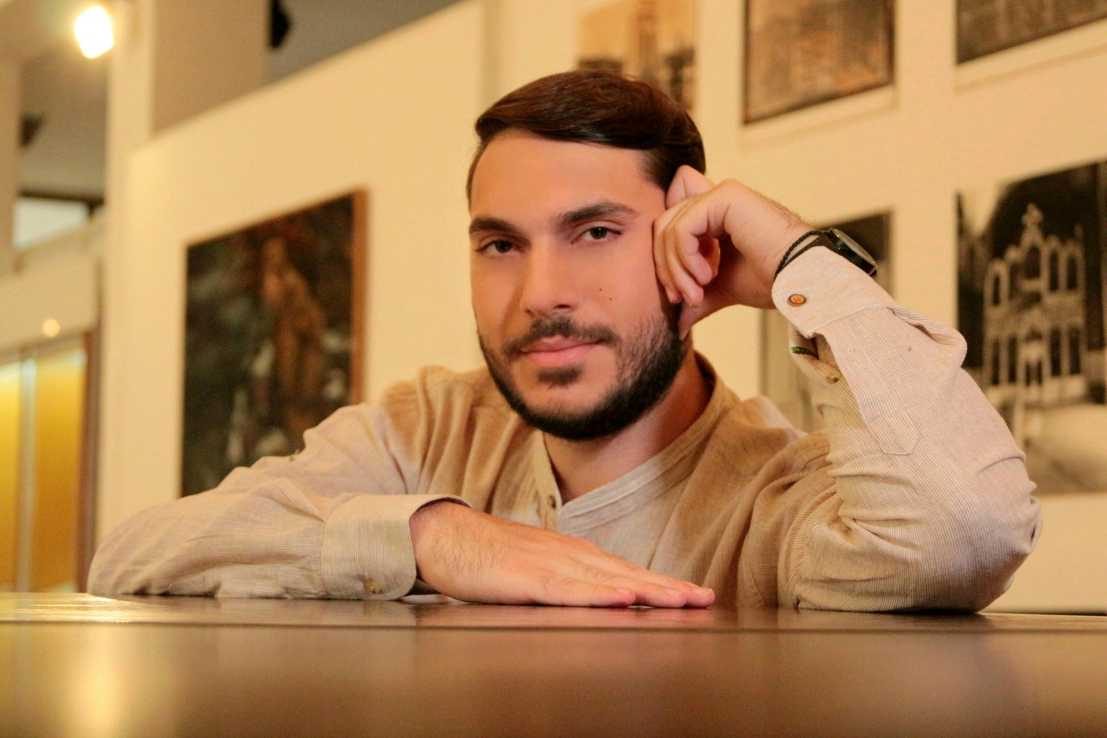 Srpski (latinica): Nemanja Kovačević, srpski novinar i voditelj